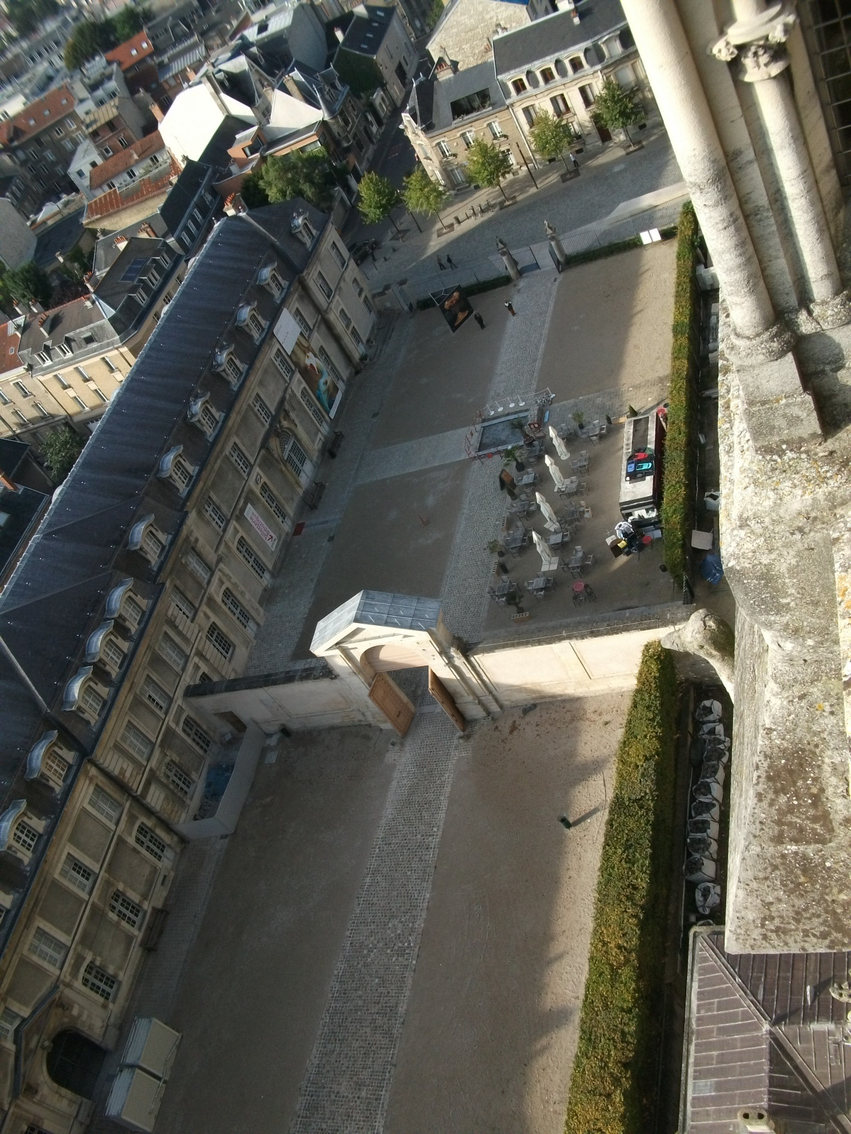 l'entrée du Palais du Tau vu depuis la cathédrale.